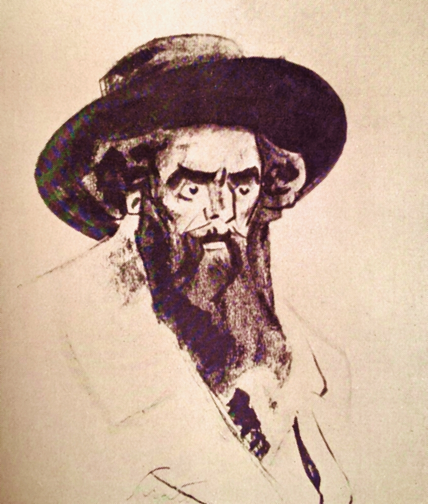 Portretul lui Octav Bancila